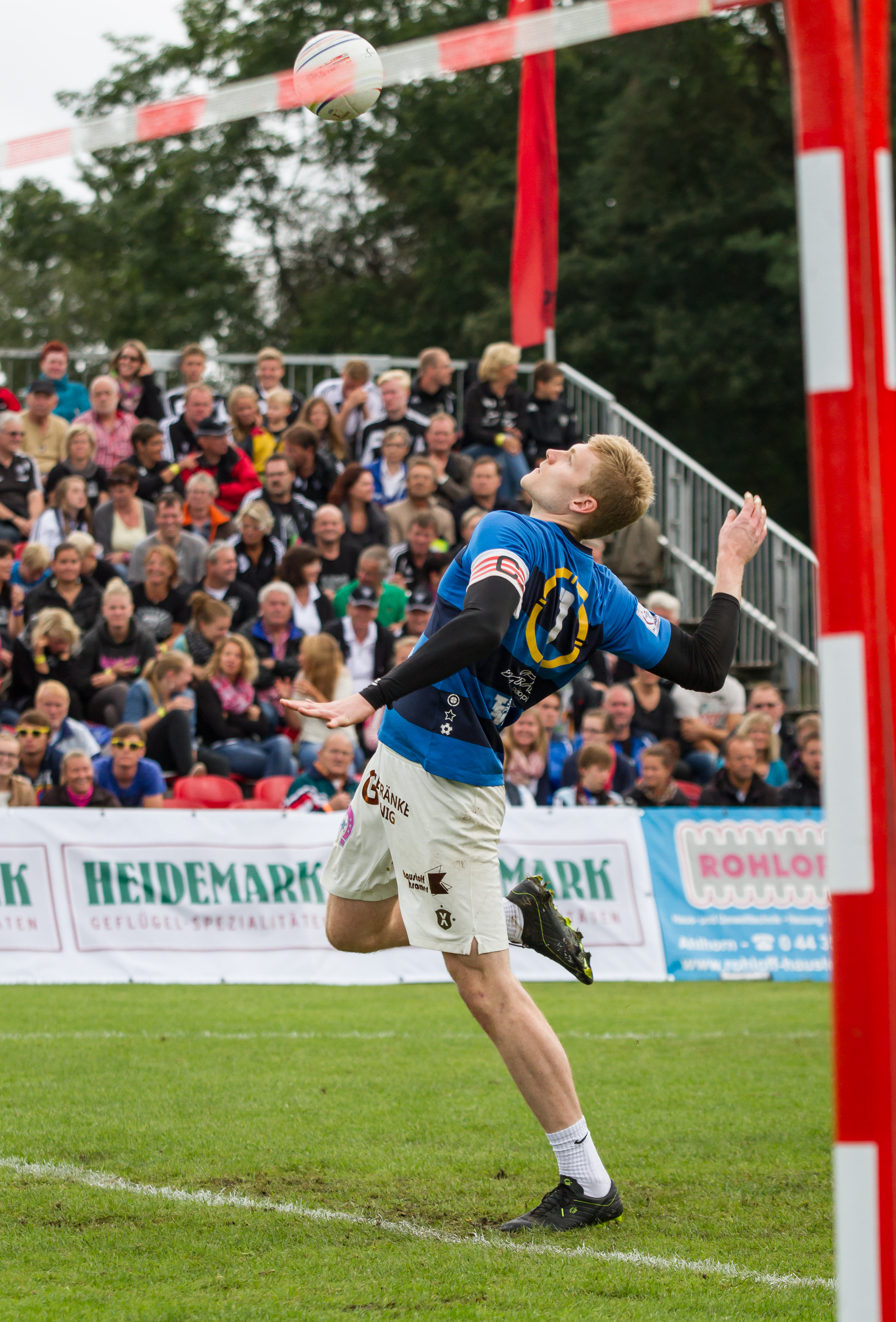 Patrick Thomas, TSV Pfungstadt in der Angabe